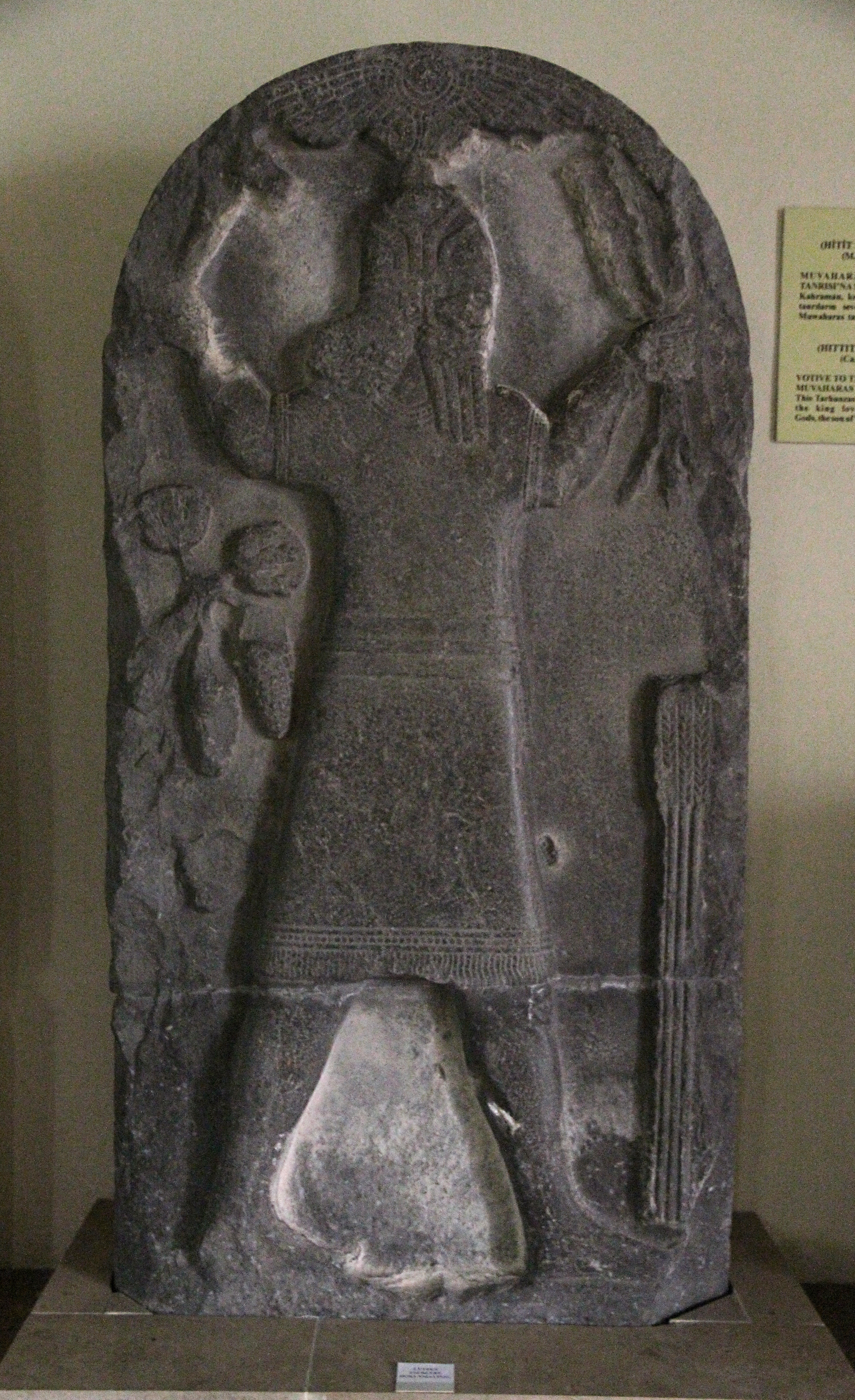 Archäologisches Museum Niğde, Türkei, späthethitische Stele von Niğde. Die Stele zeigt den Wettergott, sie wurde von Muwaharanis errichtet und seinem Vater Warpalawas gewidmet.